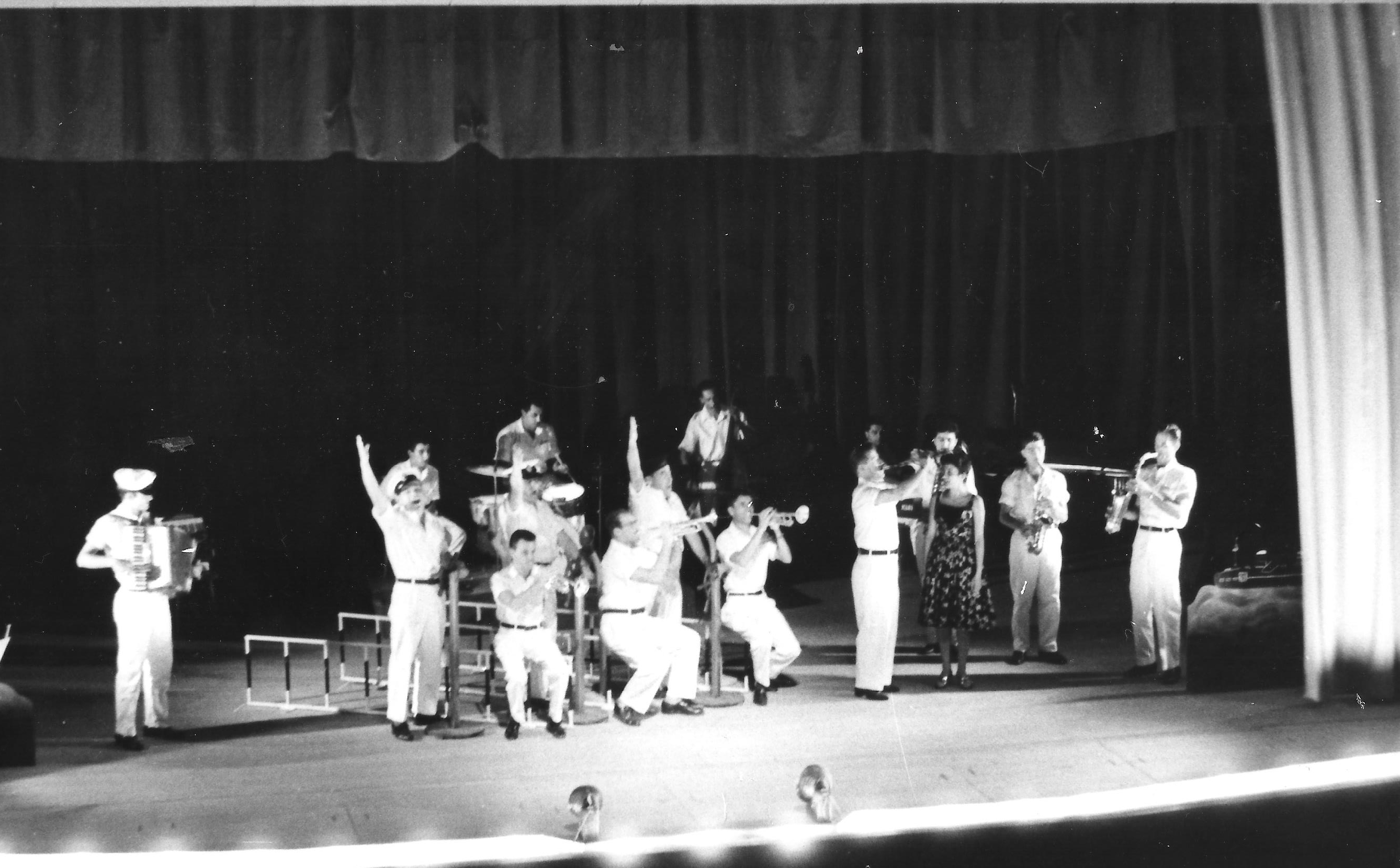 חברי הלהקה בהופעה הראשונה "מפגש ה-13